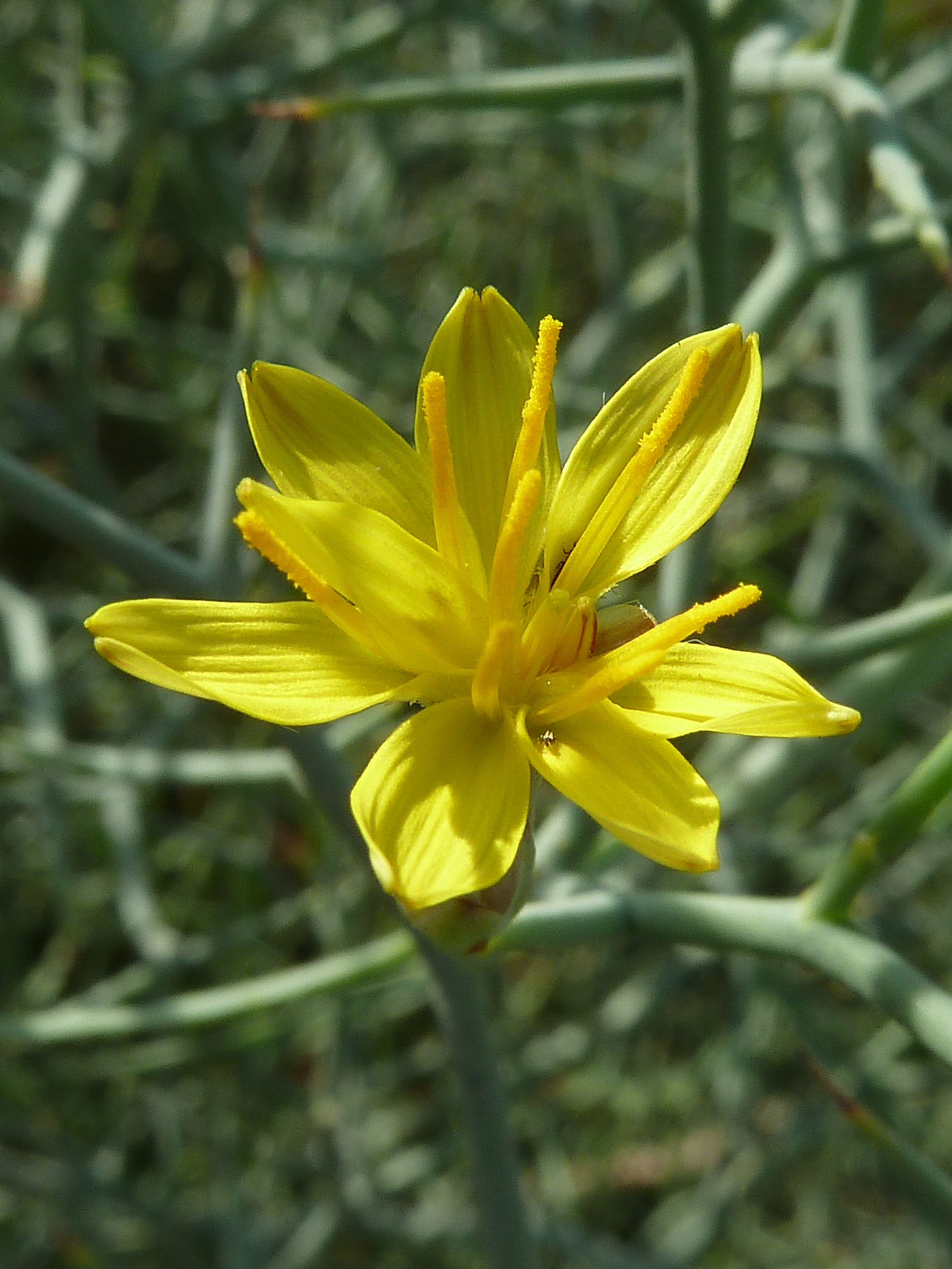 Launaea arborescens (Aulaga morisca) - Capítulo. - Descampado circa Circumvalación Norte, Águilas (Provincia de Murcia, España).